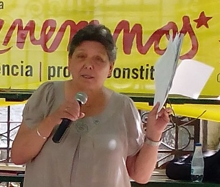 Gabriela Serra i Frediani en un acte de la CUP-Crida Constituent a Centelles (Osona, Catalunya, Països Catalans).